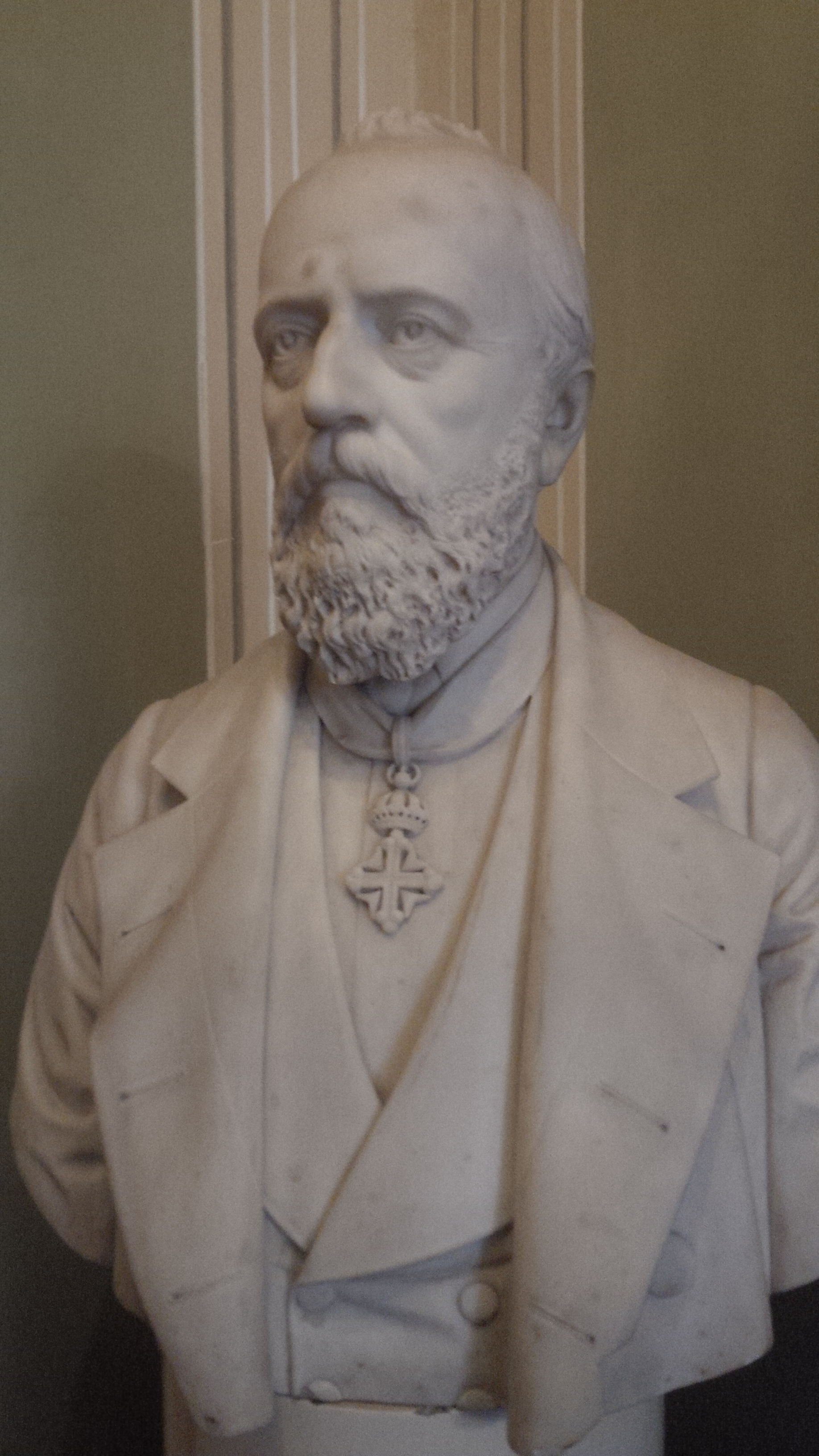 Busto del Senatore Tiberio Sergardi - opera di Tito Sarrocchi - Palazzo Fineschi Sergardi, Siena